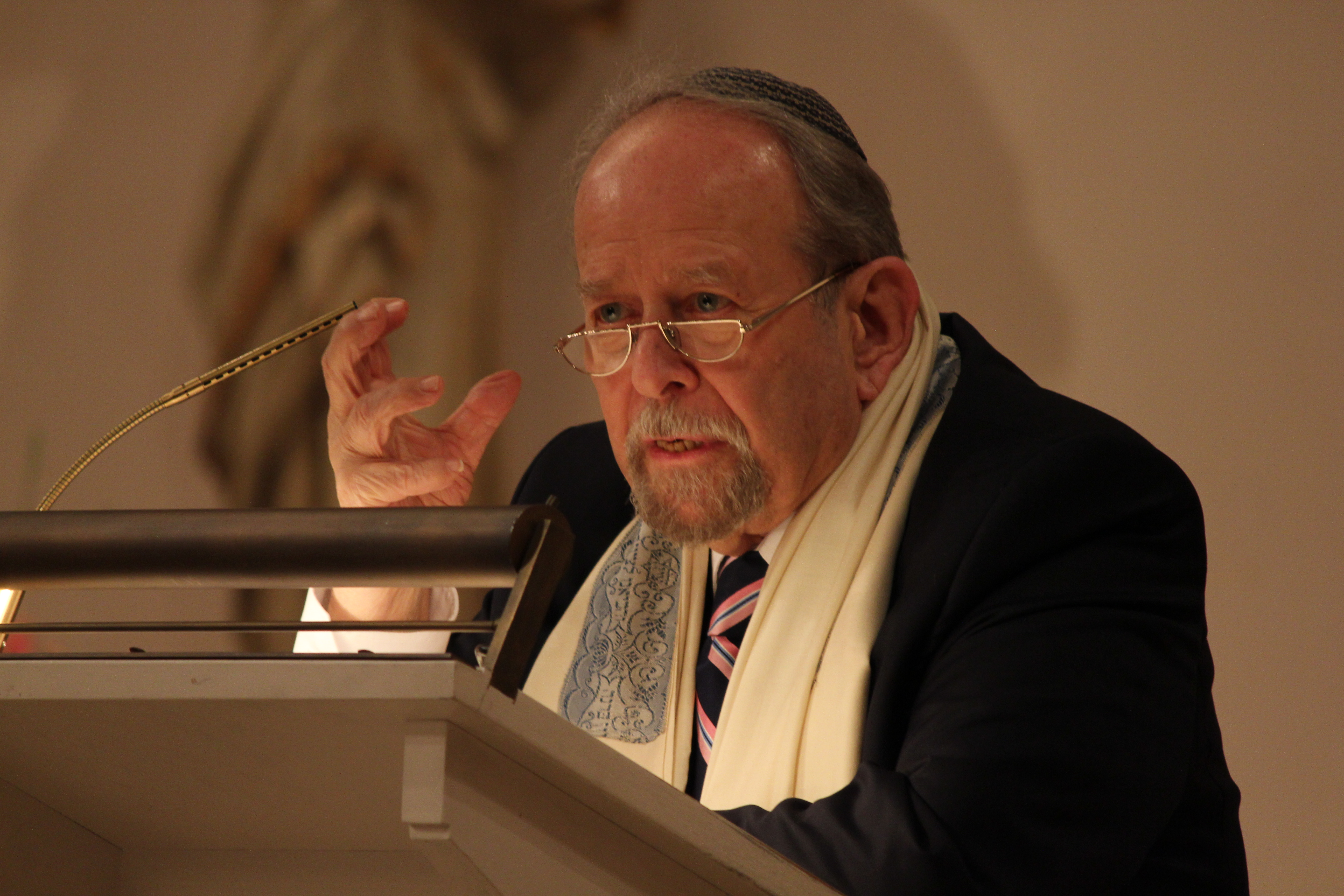 Christlich-Jüdische Gemeinschaftsfeier am Vorabend der Eröffnung der "Woche der Brüderlichkeit 2016" in der Neustädter Kirche, Hannover. Ansprache von Landesrabbiner Dr. h.c. Henry G. Brandt.